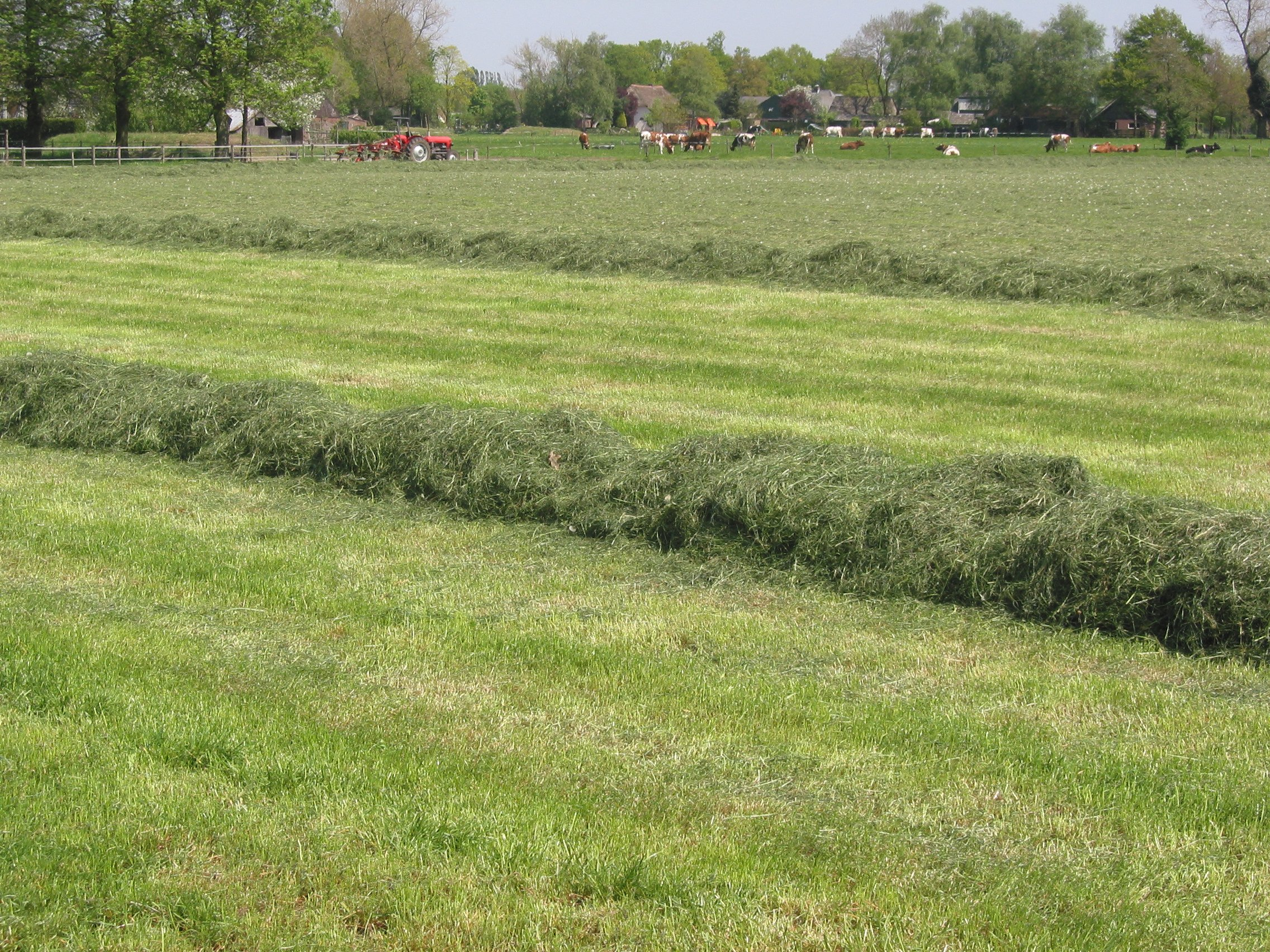 grass silage